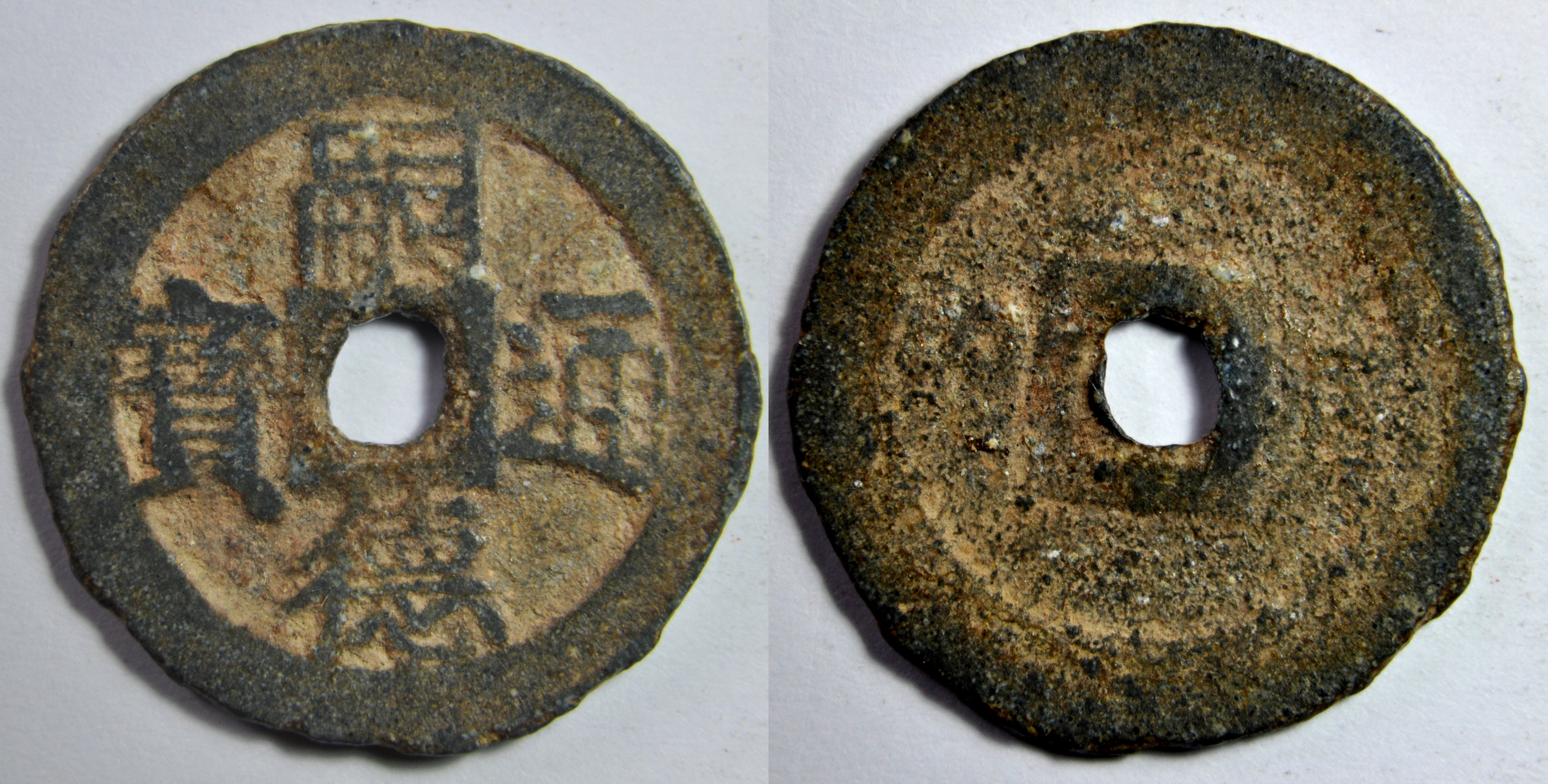 Une monnaie de 6 van en zinc de l'empereur d'Annam Nguyen Phuc Thi (1847-1883), ère Tu Duc (1848-1883), émise à l'atelier de Hanoi. A/ Tu Duc thong bao (Monnaie courante de Tu Duc) R/ Ha noi Dimension : 23.4 mm Poids : 2,1 g. Référence : C192.1 Le revers est difficilement lisible.